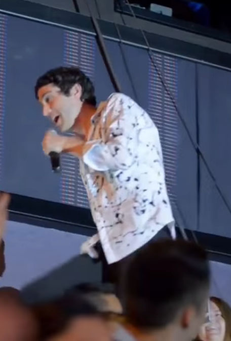 Benny Ibarra en un concierto en Cinepolis